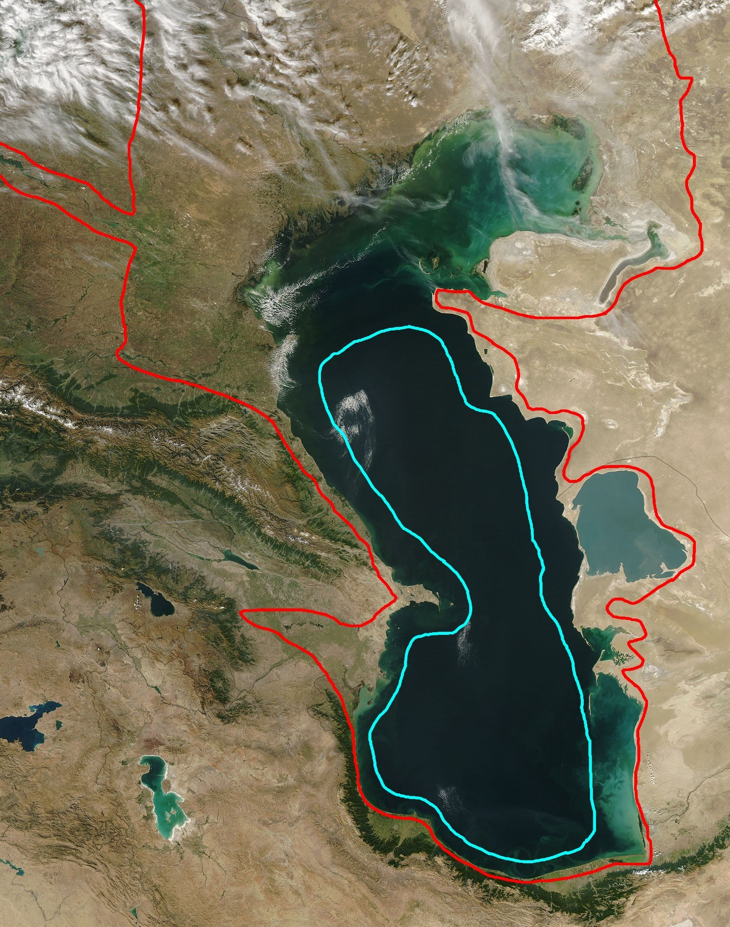 Максимальный и минимальный уровни моря